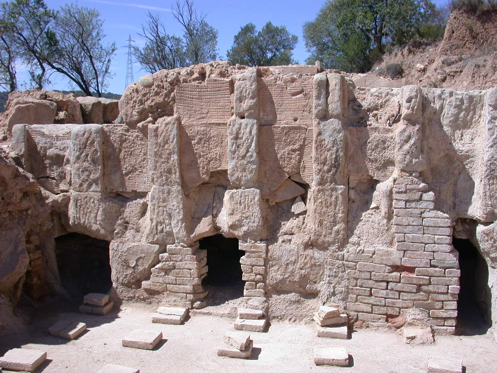 El yacimiento de Labitolosa corresponde a una ciudad hispanorromana situada cerca del actual municipio de La Puebla de Castro (Huesca), sobre el pantano de Barasona, a la derecha del Ésera. Labitolosa es la cabeza de un territorio que ocupa la vertiente meridional de los Pirineos centrales, limitando al norte con la localidad de Saint-Bertrand-de-Comminges, la antigua Lugdunum Convenarum. Los orígenes de esta ciudad se remontan a finales del siglo I a.C.